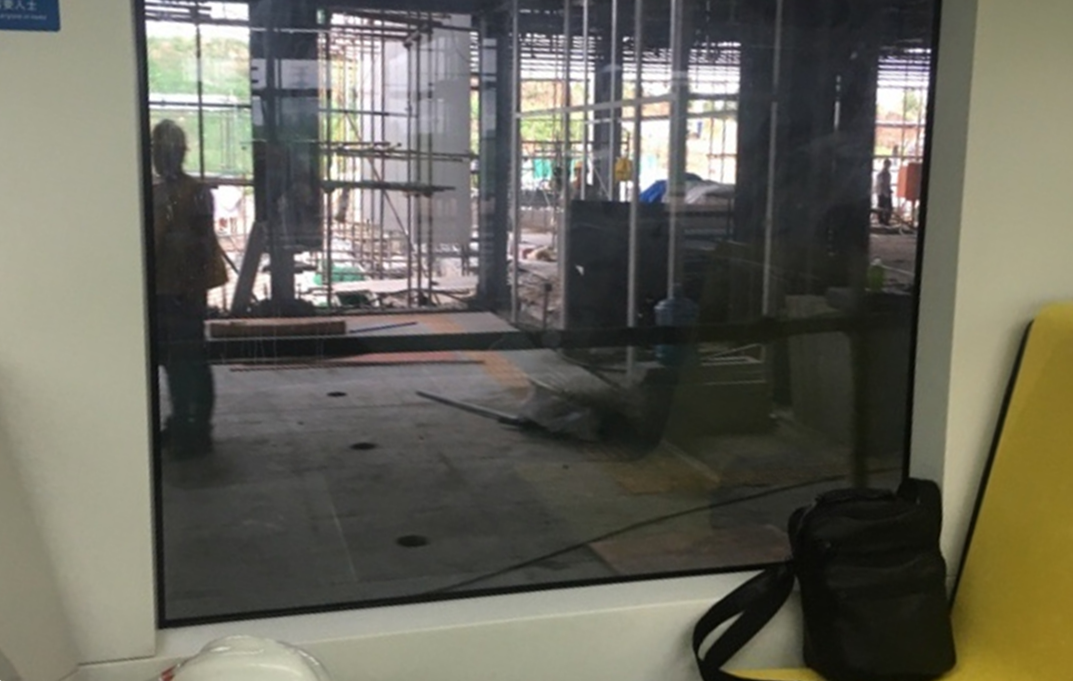 从北湖线车内看装修中的北湖线站台